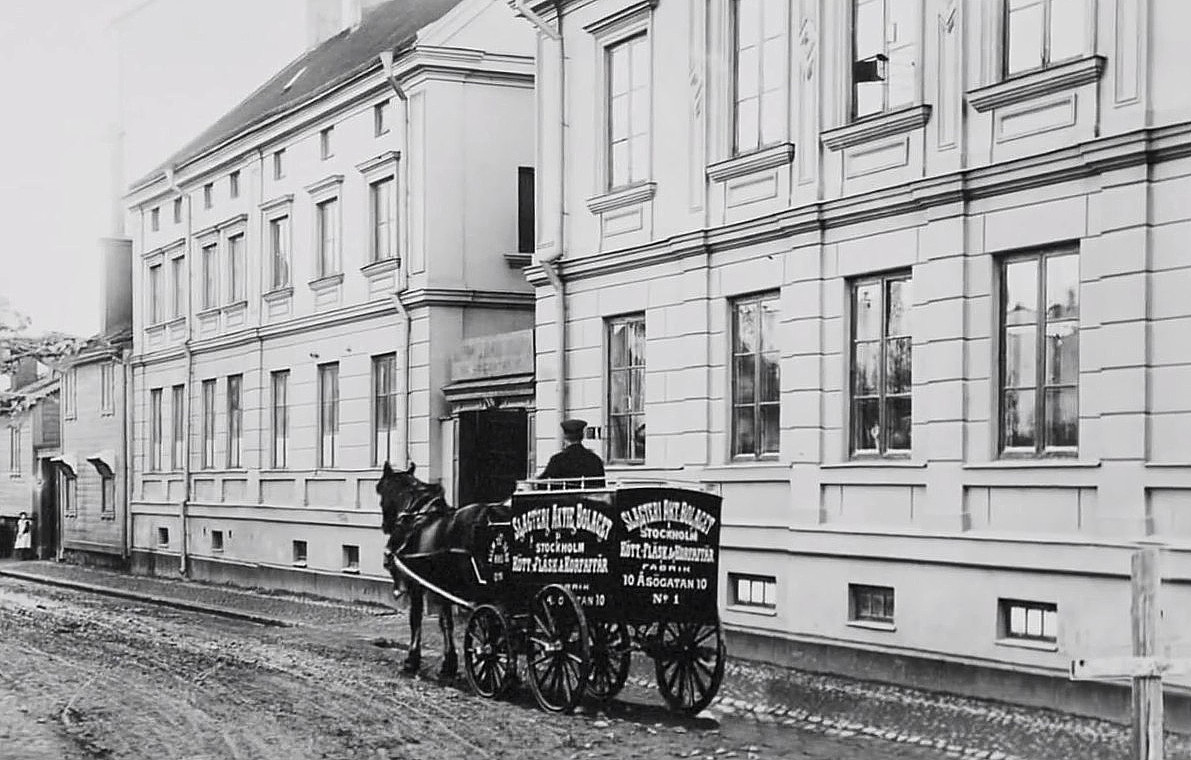 Slagteriaktiebolaget i Stockholm, hästtransport